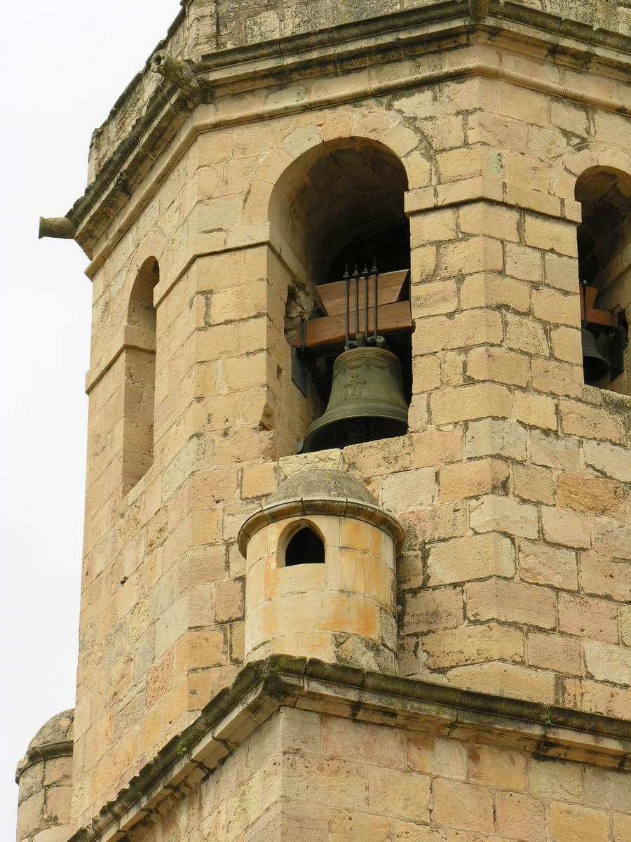 Campanar de Tivissa, Ribera d'Ebre